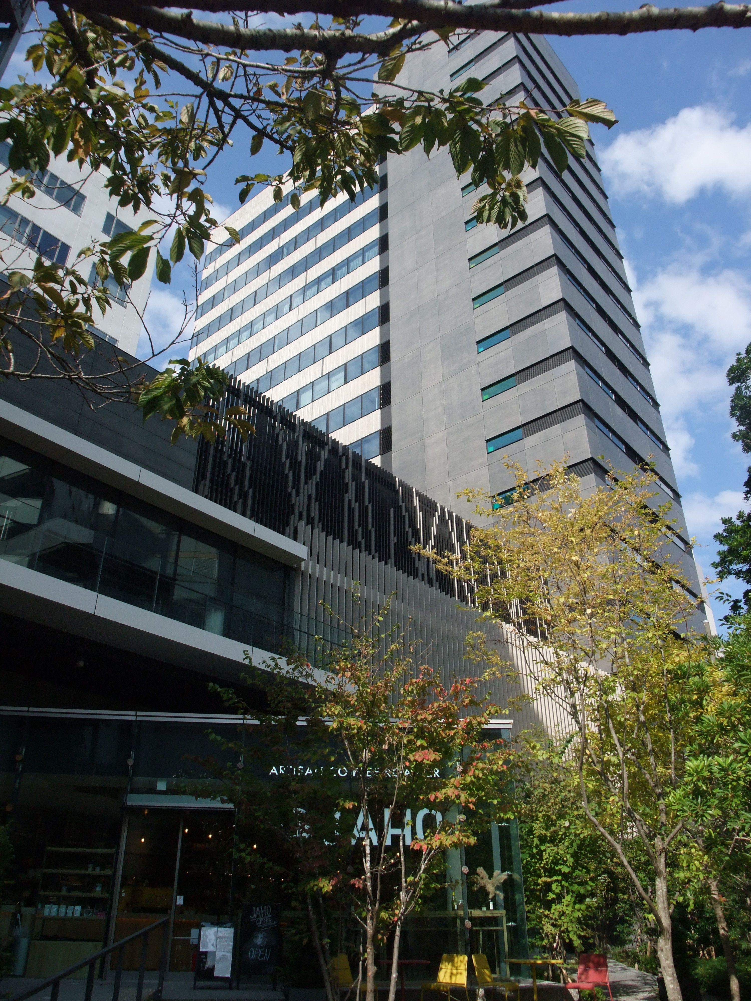 東京都港区芝（田町）にあるGーBASE 田町ビル